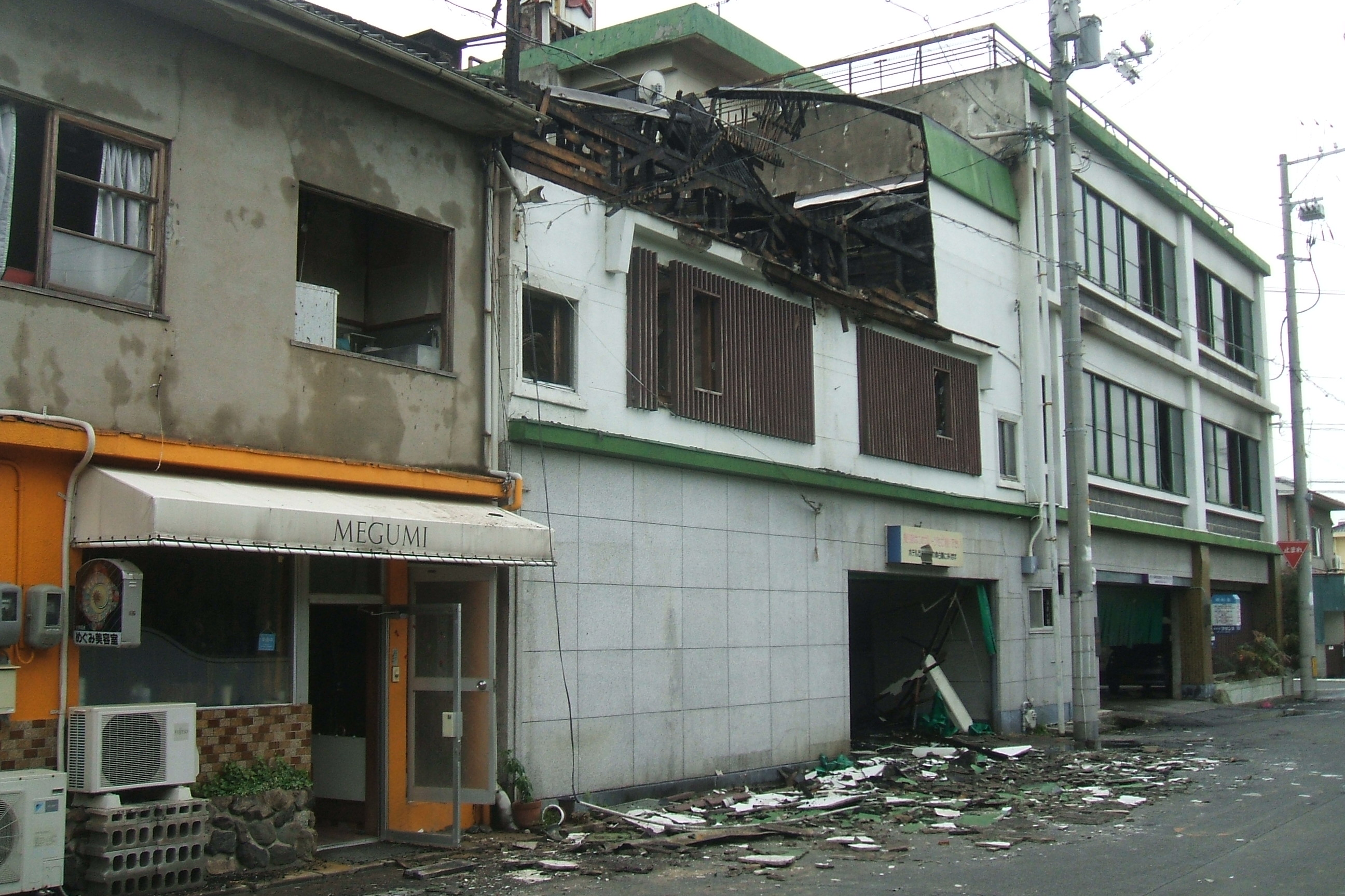 2012年5月13日に広島県福山市西桜町で発生したホテル火災現場を東側の路地より撮影。左側は延焼した美容院